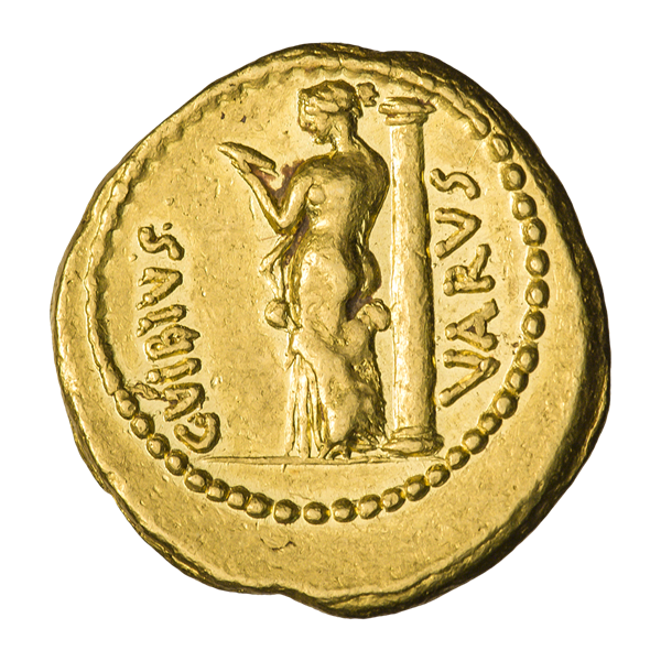 Ауреус. Ок. 42 г. до н.э. Рим. Монетарий Гай Вибий Вар. Реверс. Надпись C.VIBIVS VARVS. Венера (богиня любви и красоты) стоит, влево; смотрится в зеркало, которое держит в левой руке. Точечный ободок.